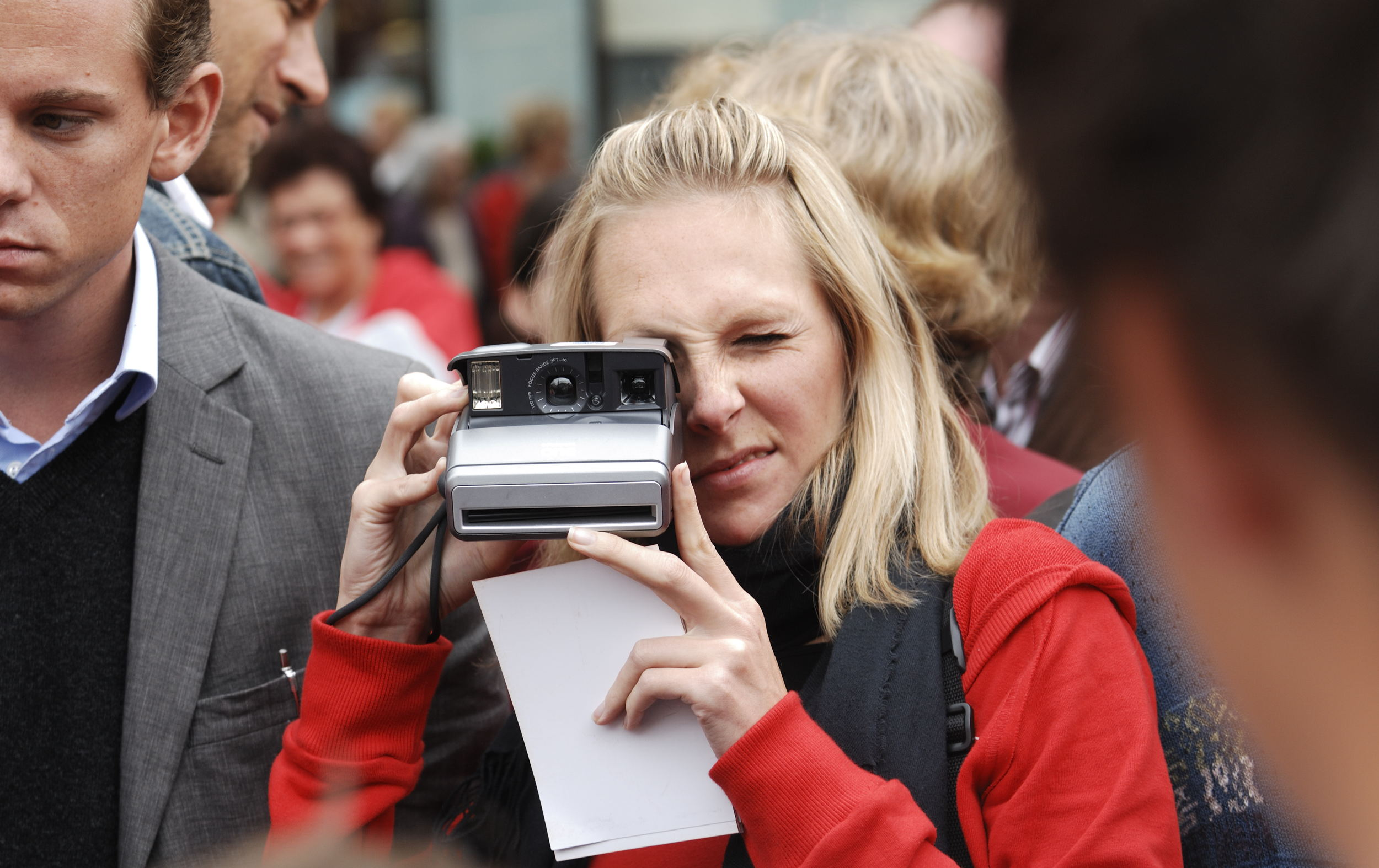 Polaroids auf dem Hauptplatz in Leibnitz. 13.09.2008, © Thomas Jantzen/SPÖ.